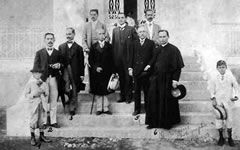 Visita de Ruy Barbosa à prefeitura de Poços de Caldas, sob administração de Francisco Escobar (ambos na foto)